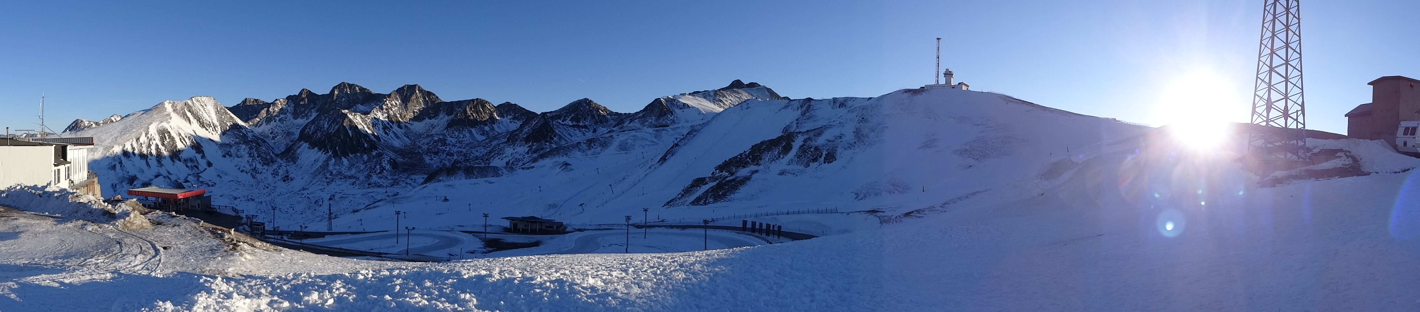 Port d'Envalira, Andorre